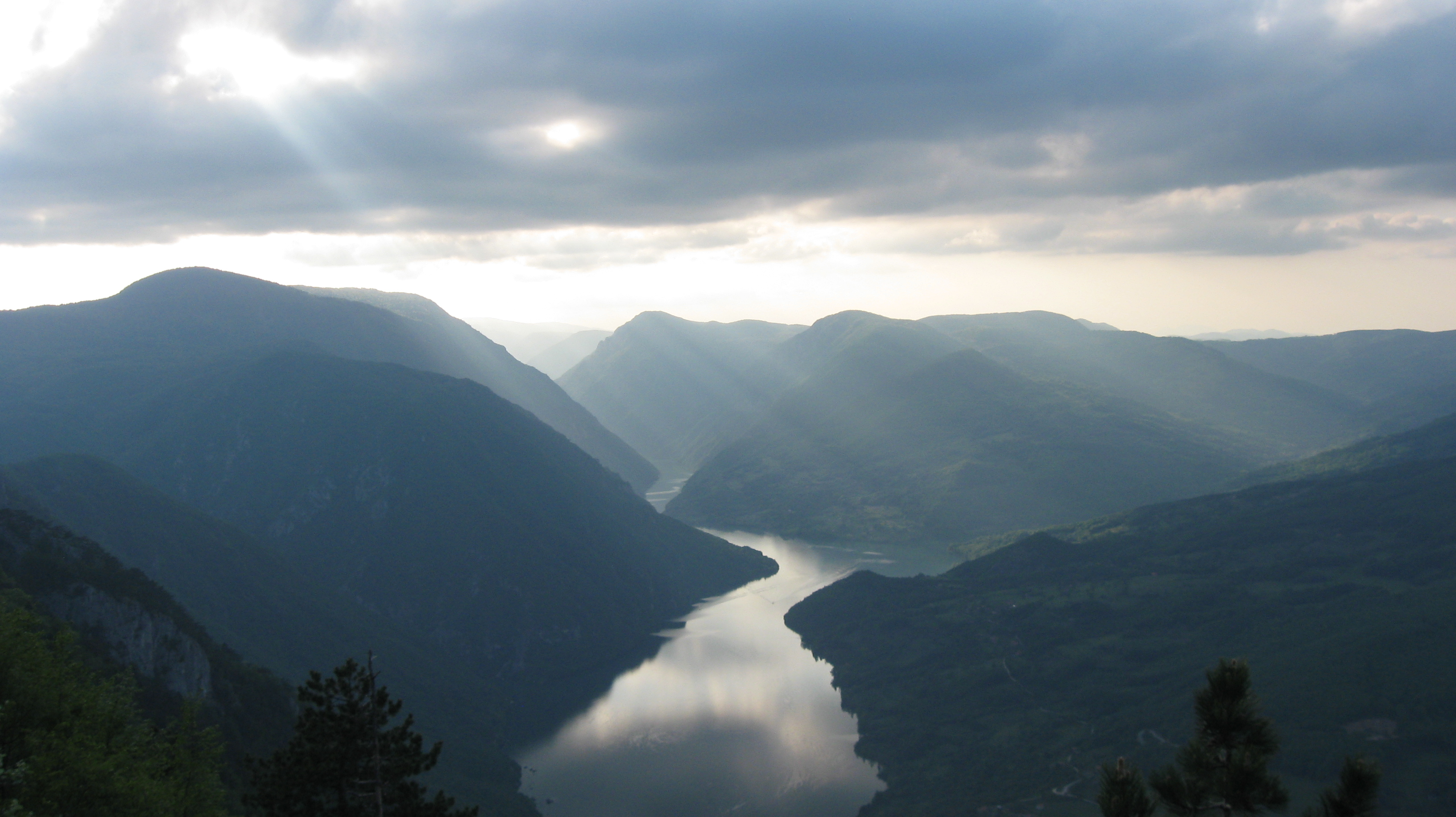 Pogled sa Tare